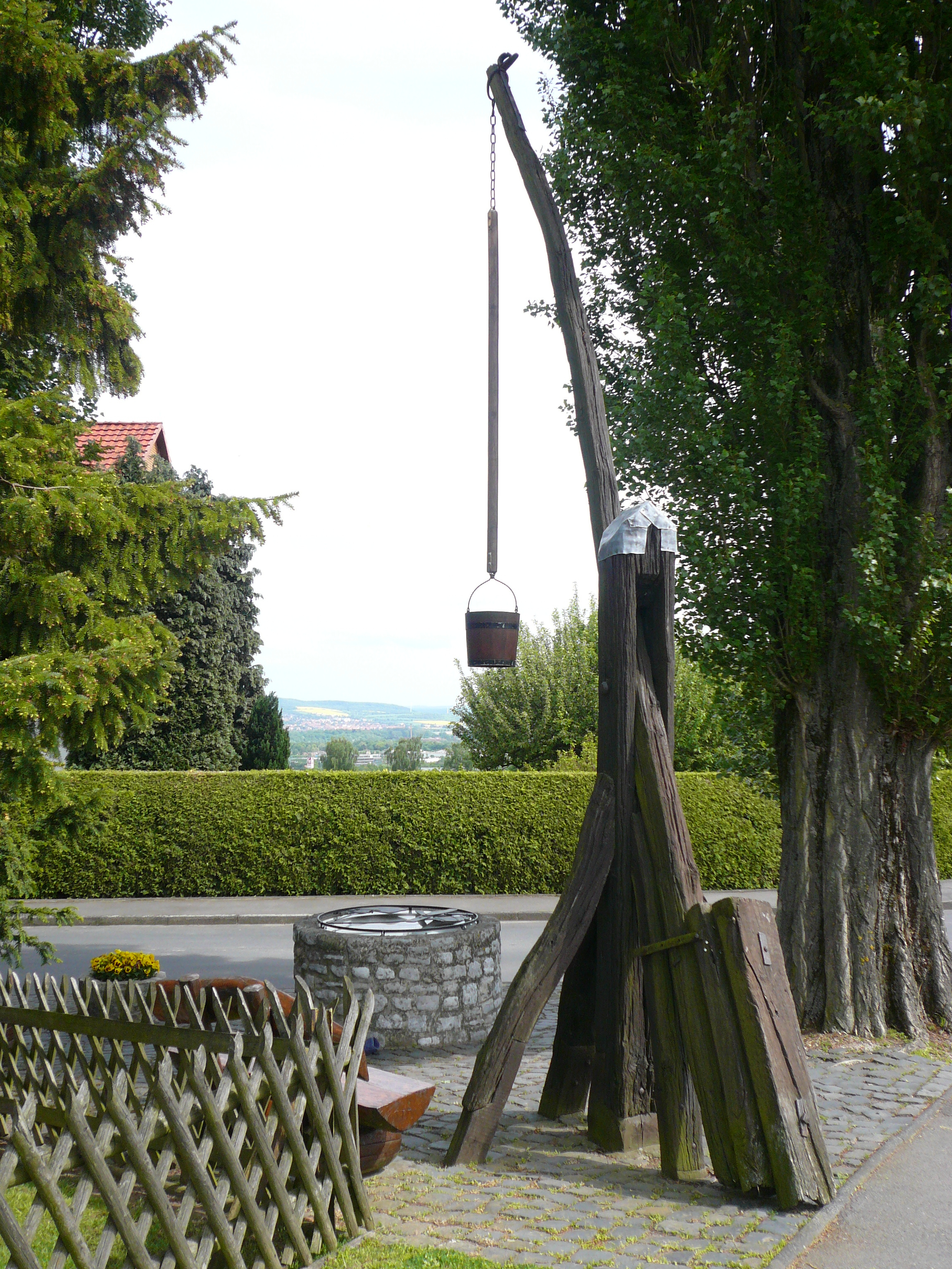 Klotzbrunnen in Hetjershausen, Straßenecke In der Wehm - Am Klotzbrunnen